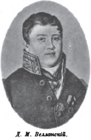 Велланский Д.М. (1774 - 1847) - русский медик